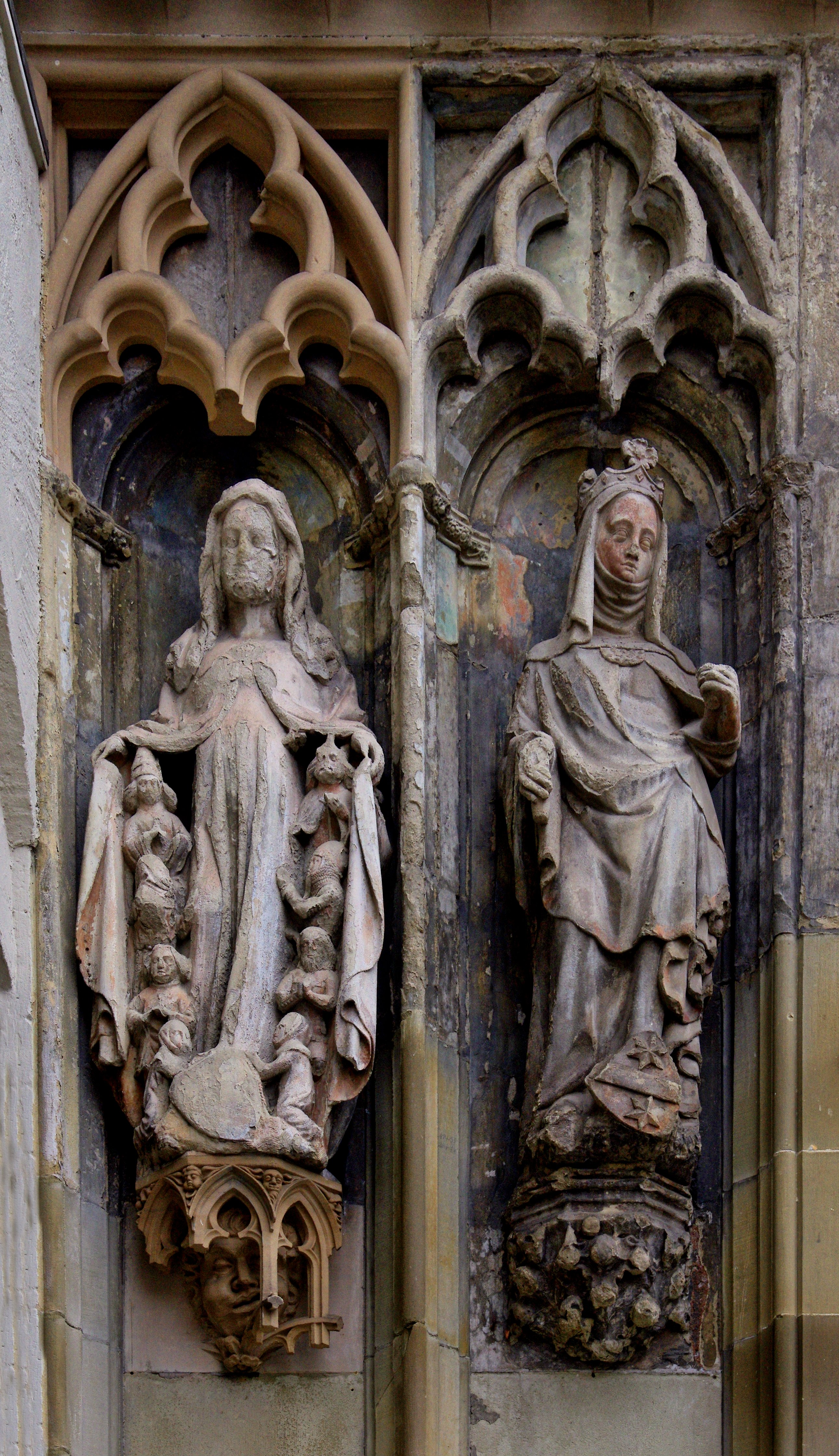 Bilder von dem Augsburger Dom. Das Südportal